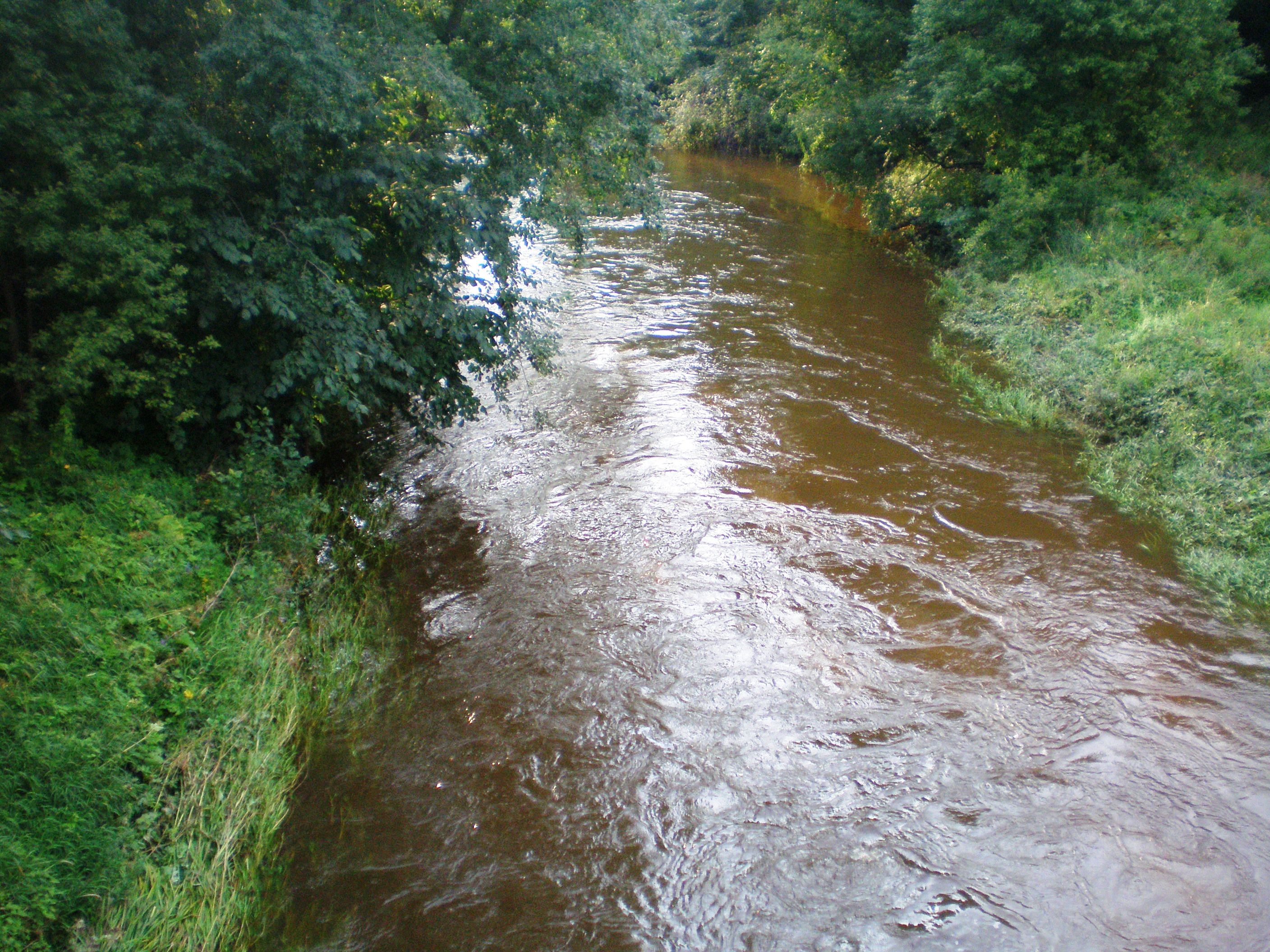 Šešuvis river